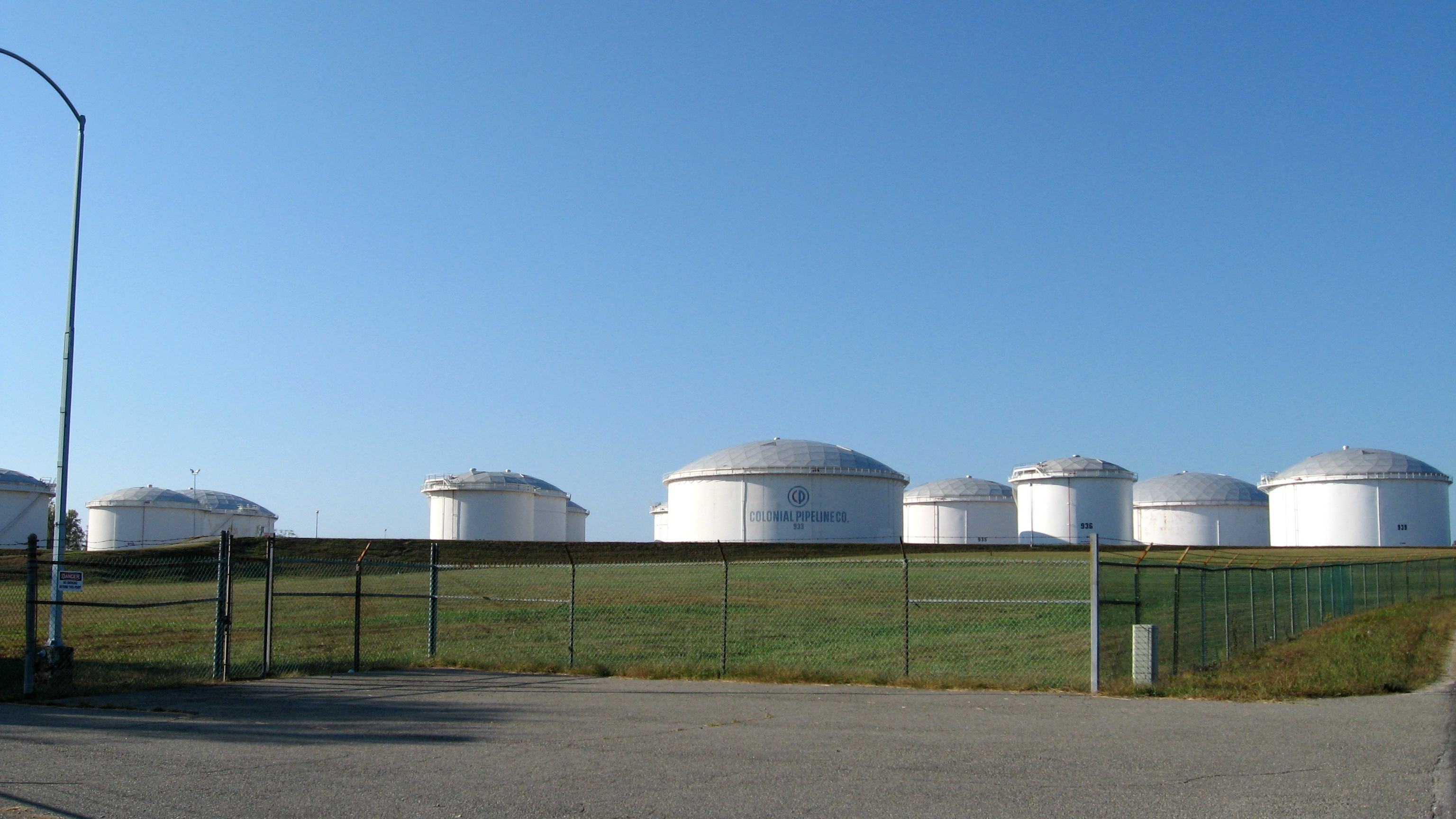 Tank Farm